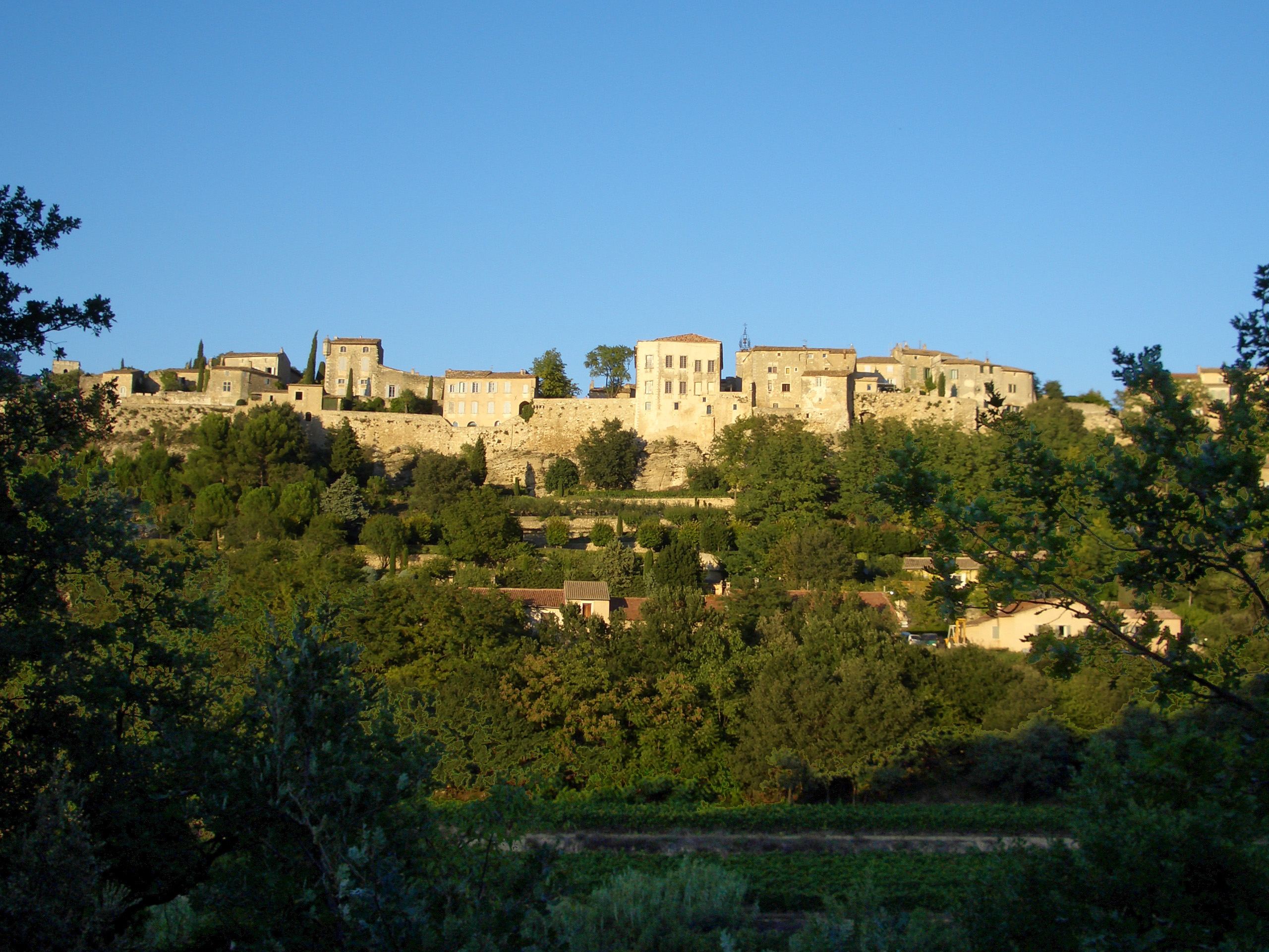 Vue générale de Ménerbes